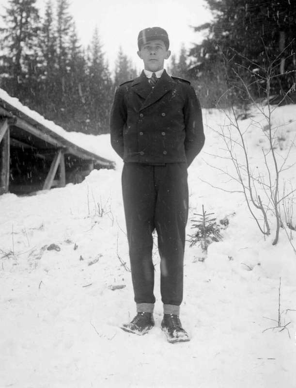 Norwegian skier Kaare Busterud in Lillehammer